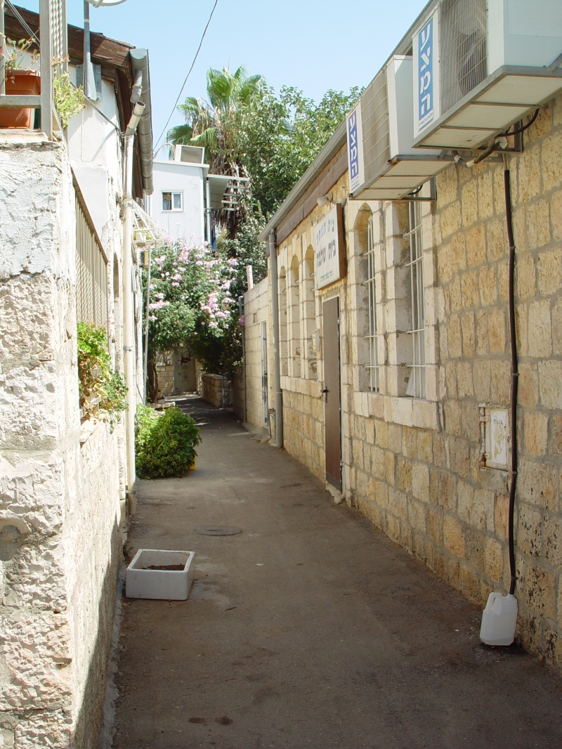 סמטא בשכונת אהל שלמה